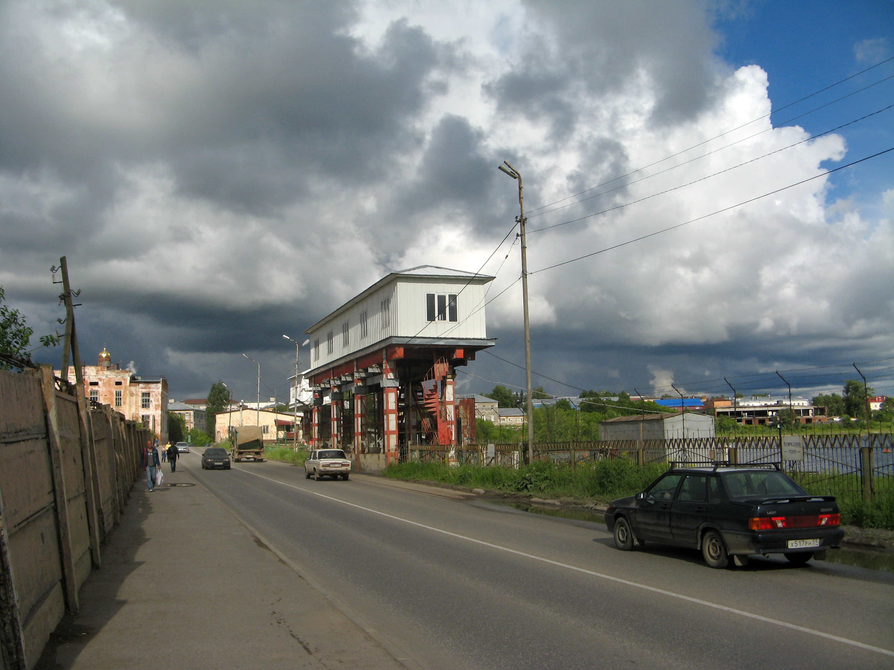 Заводская плотина: через р. Лысьва, Лысьва, Пермский край